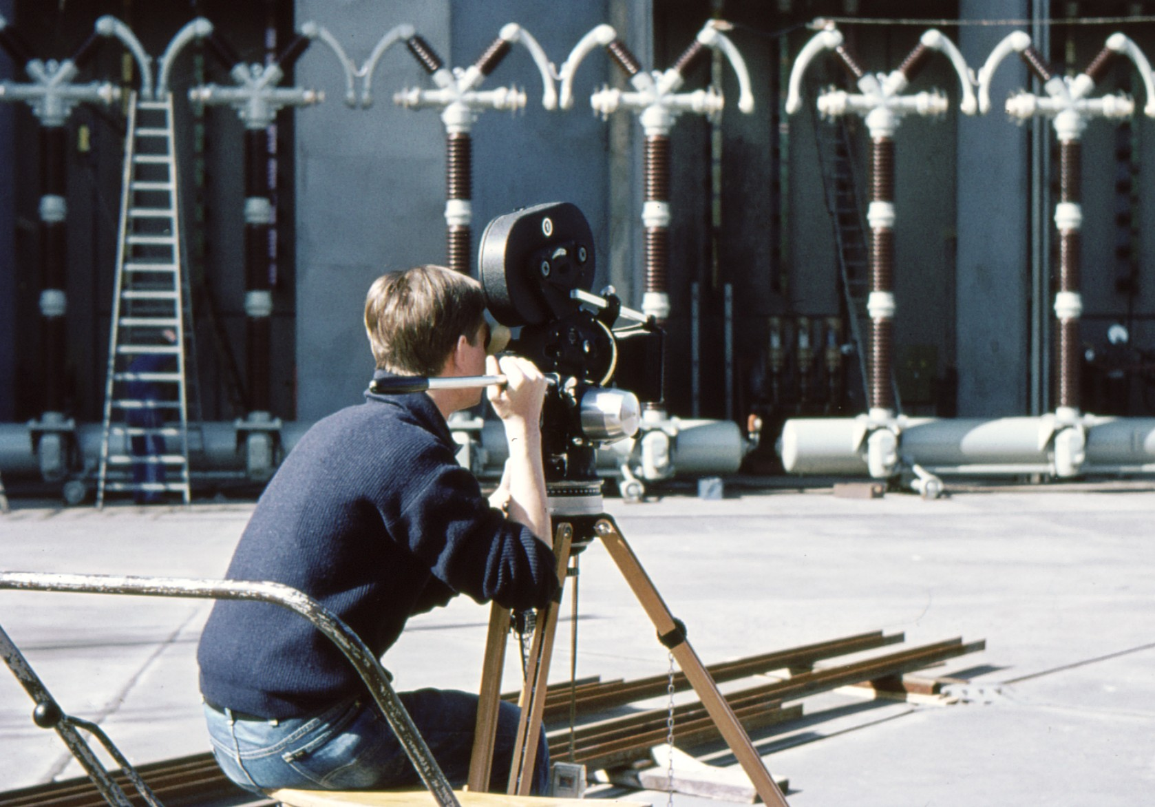 ARRIFLEX 35 II HS (high speed) im Einsatz, AEGs Hochspannungsinstitut in Kassel 1964, hinter der Kamera; Holger Ellgaard.